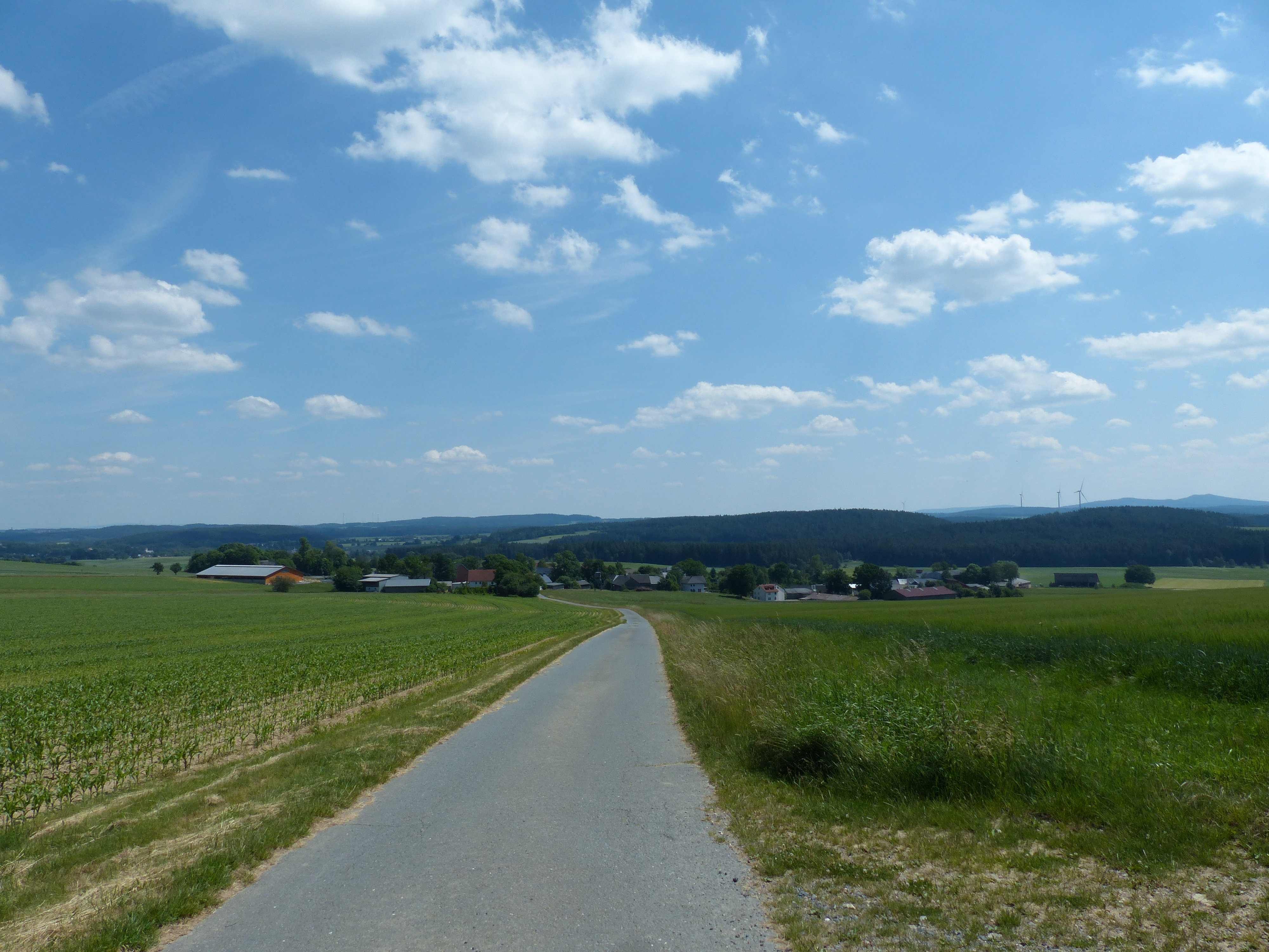 Ortansicht aus Richtung Kirchenlamitz